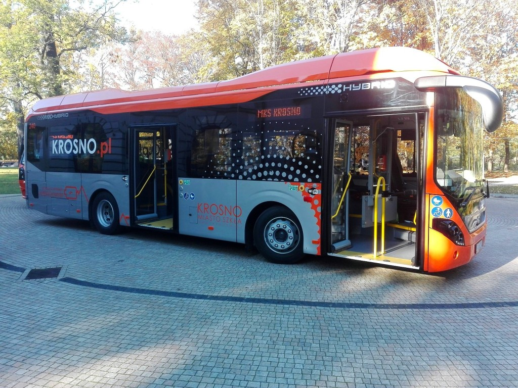 Hybrydowy autobus MKS KROSNO